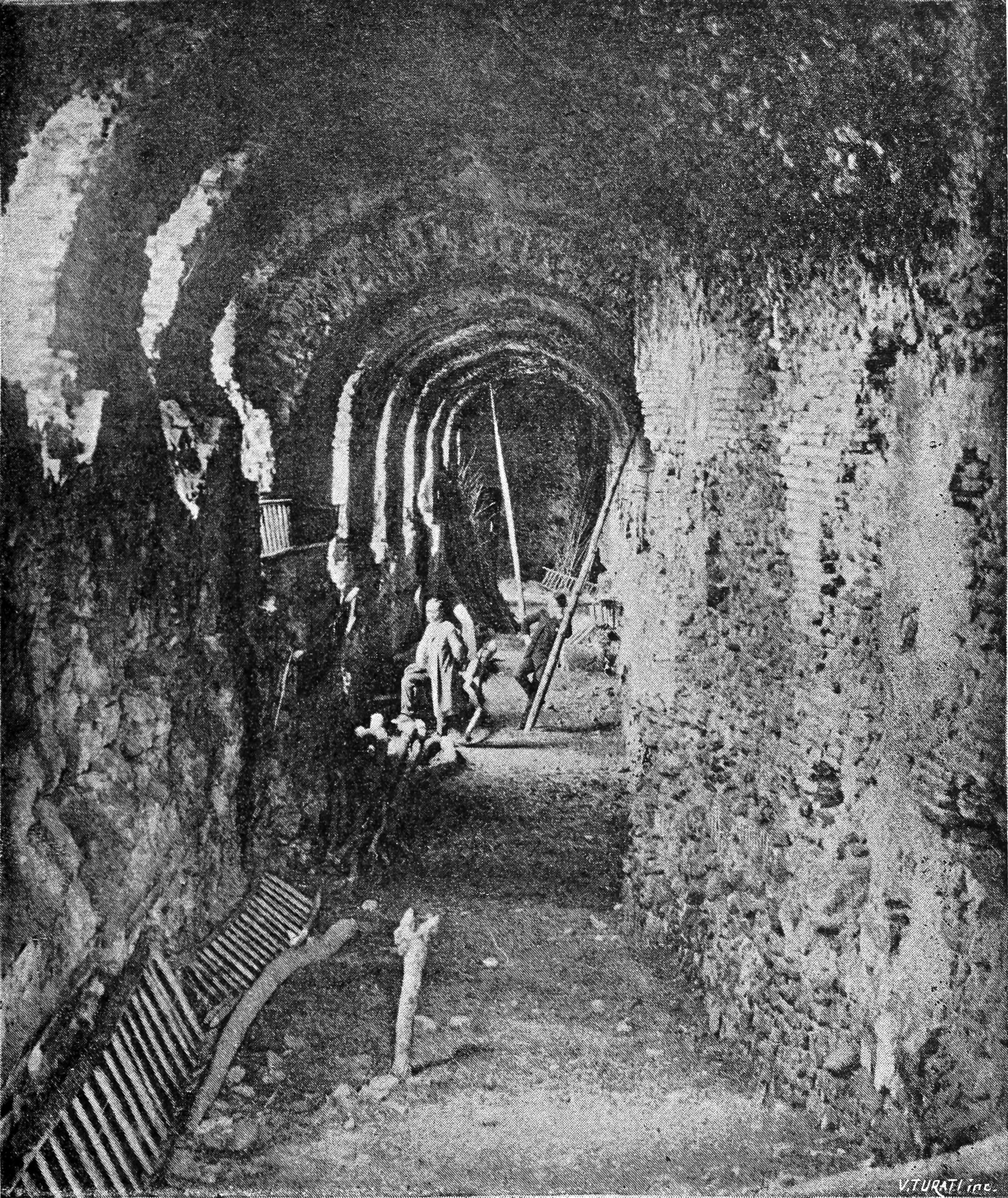 Illustrazioni da I monumenti e le opere d'arte della città di Benevento: lavoro storico, artistico, critico, di Almerico Meomartini, Tipografia di L. de Martini e figlio, Benevento, 1889